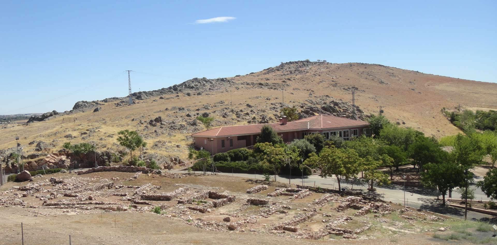 Yacimiento arqueológico del Cerro de Alarcos (Ciudad Real - España), restos del asentamiento íbero (siglos V - III antes de Cristo).